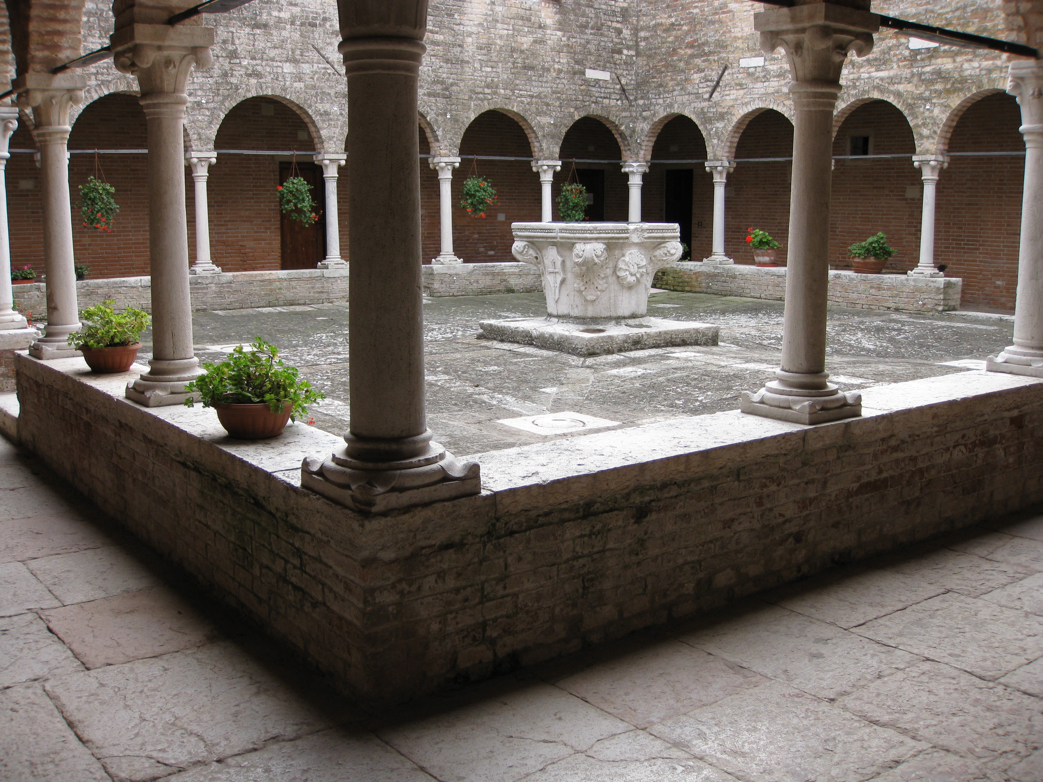 Il chiostro sull'isola di San Francesco del Deserto a Venezia.